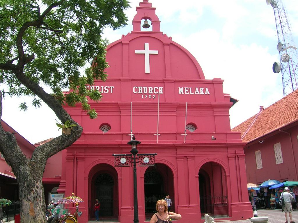 Melaka, Malaysia (Author: Winey)